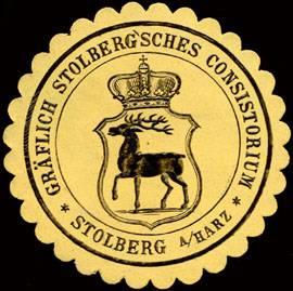 Sealing stamp Title: Gräflich Stolbergsches Consistorium - Stolberg am Harz Description: schwarz, gelb, geprägt Place: Stolberg size: 4 cm